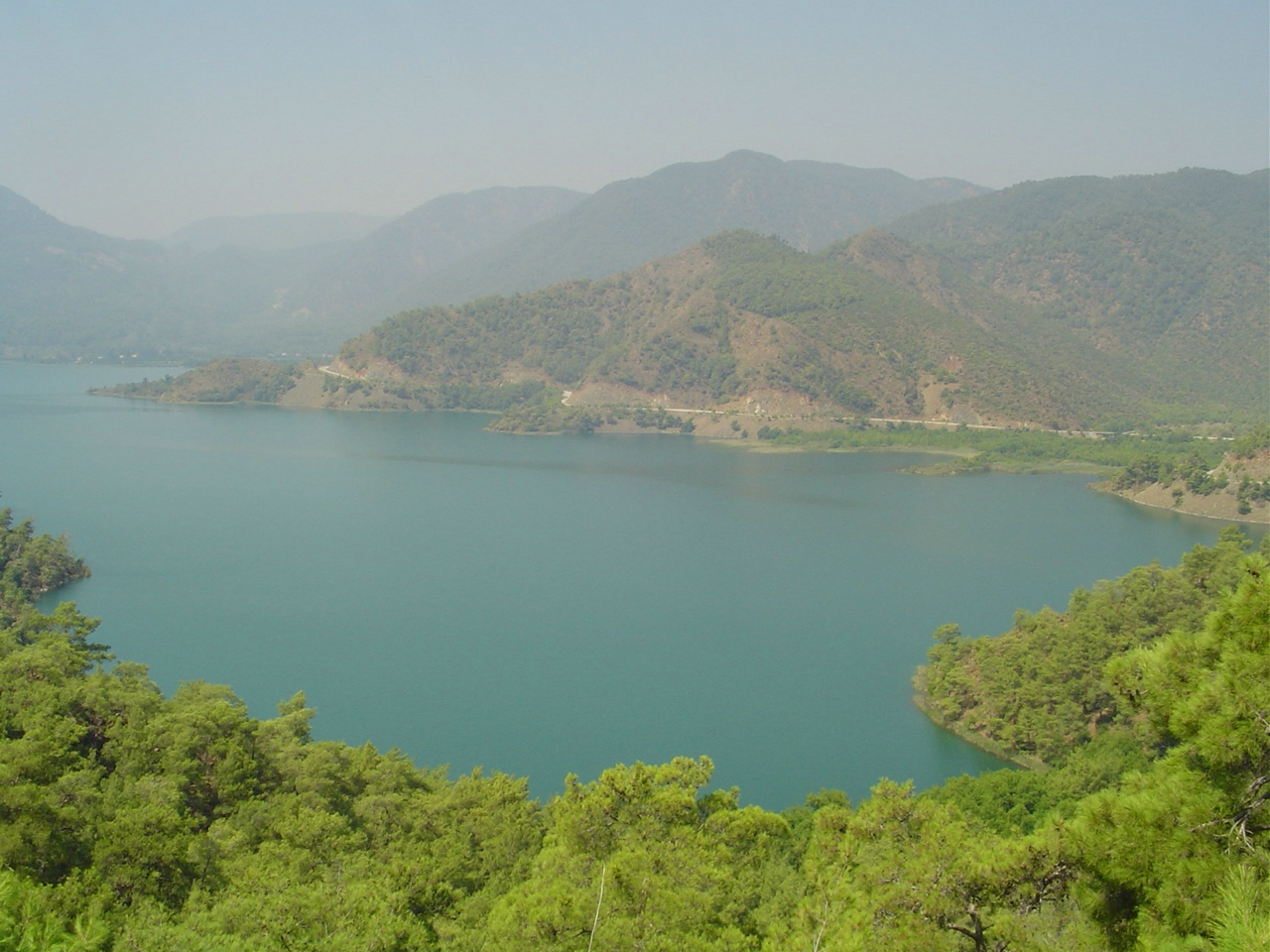 Lac de Köycegiz